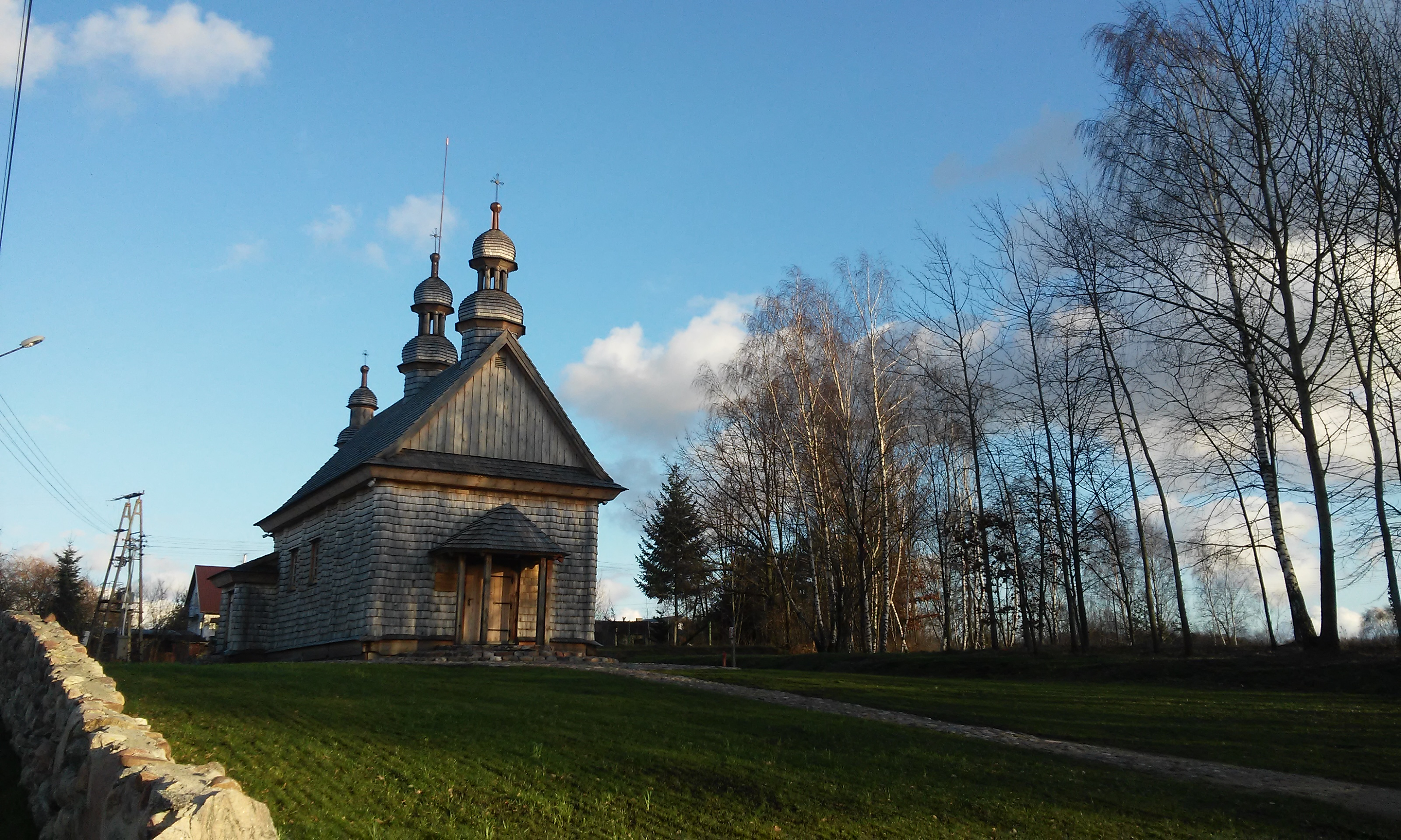 Cerkiew Opieki Matki Bożej w Godkowie